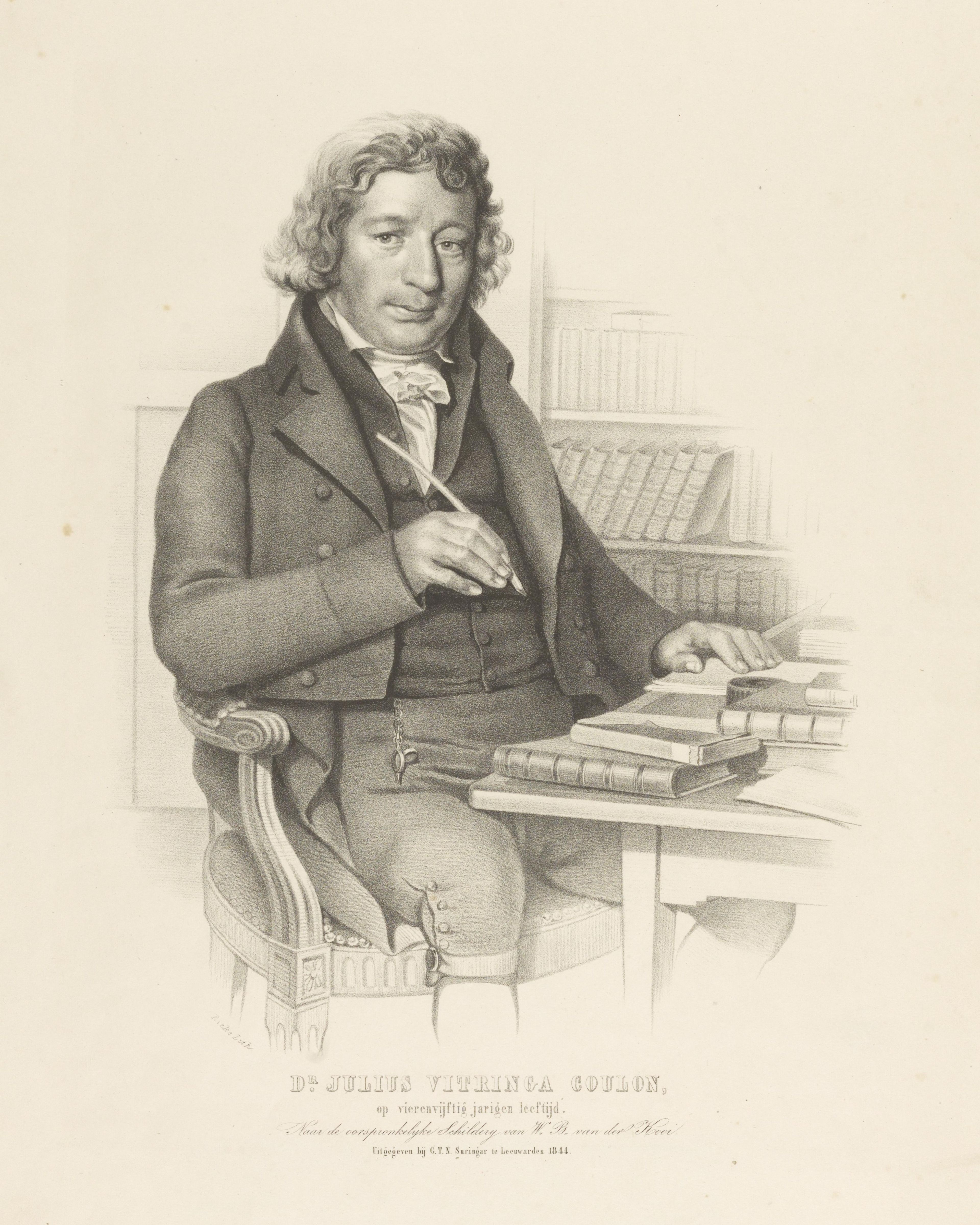 Dr. Julius Vitringa Coulon (1767-1843) op 54-jierrige leeftiid nei it oarspronklike skilderij fan Willem Bartel van der Kooi